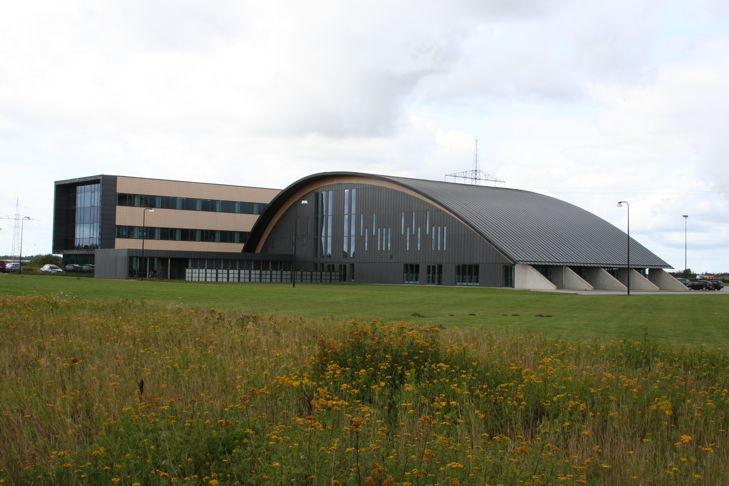 FDE-bygning i Padborg, hvor Region Sønderjylland-Schleswig er situeret